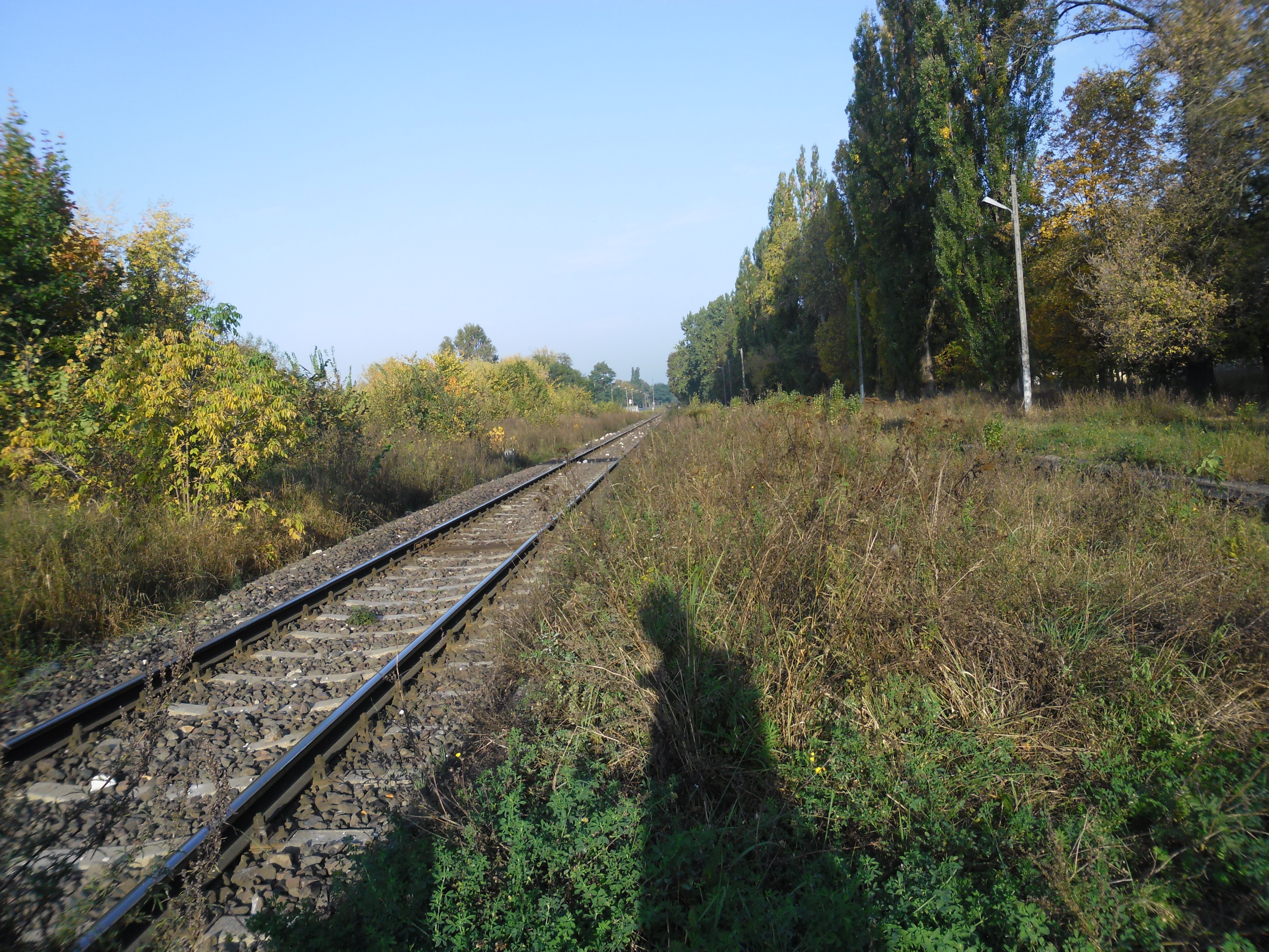 widok w kierunku Żnina